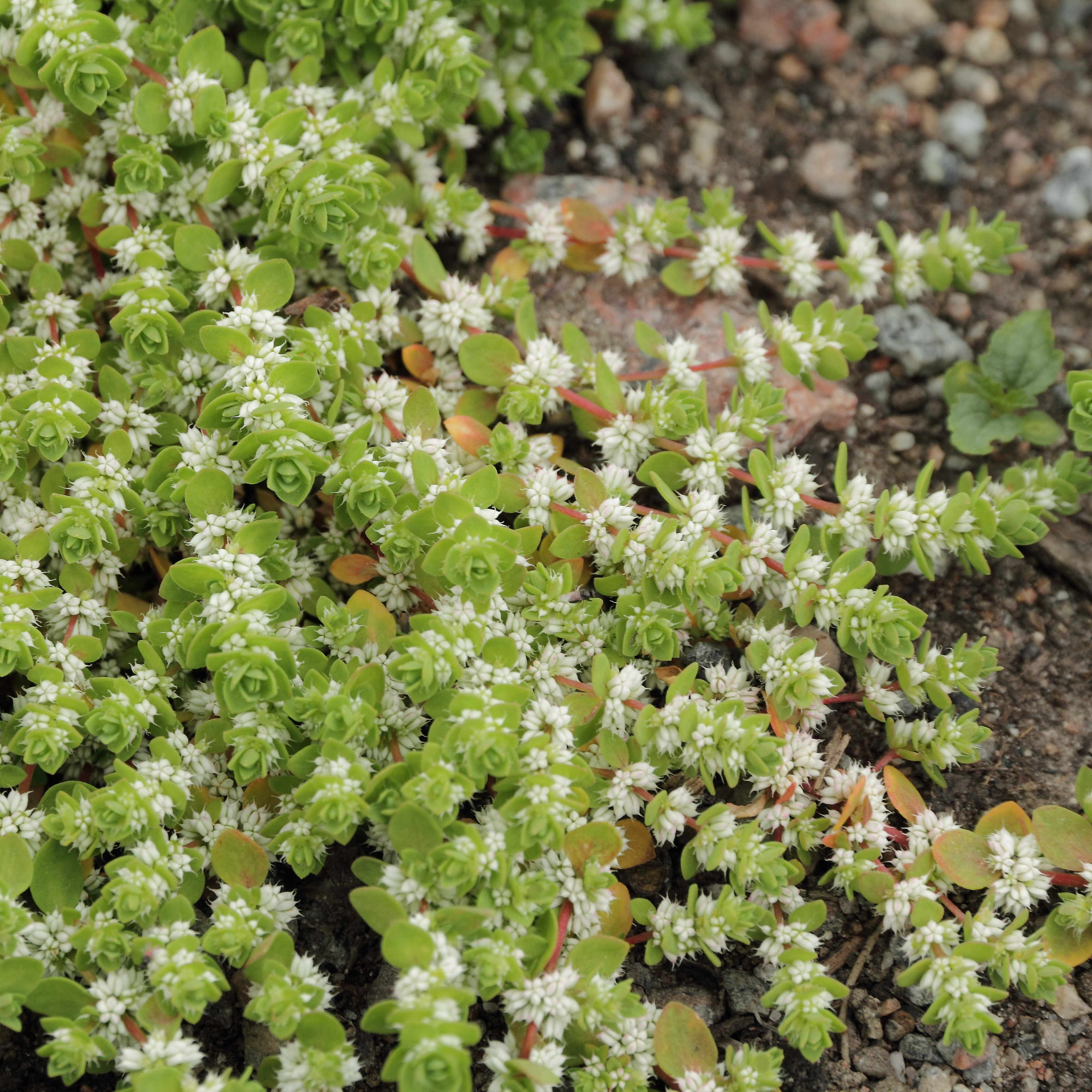 Illecebrum verticillatum i Bergianska trädgården.